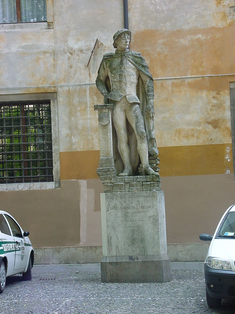 autore utente:DracoRoboter self made Statua del Ruzante, Padova